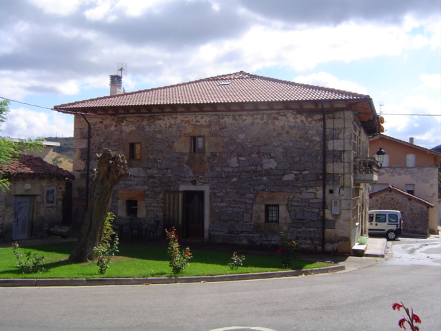 casas-huerta-abajo